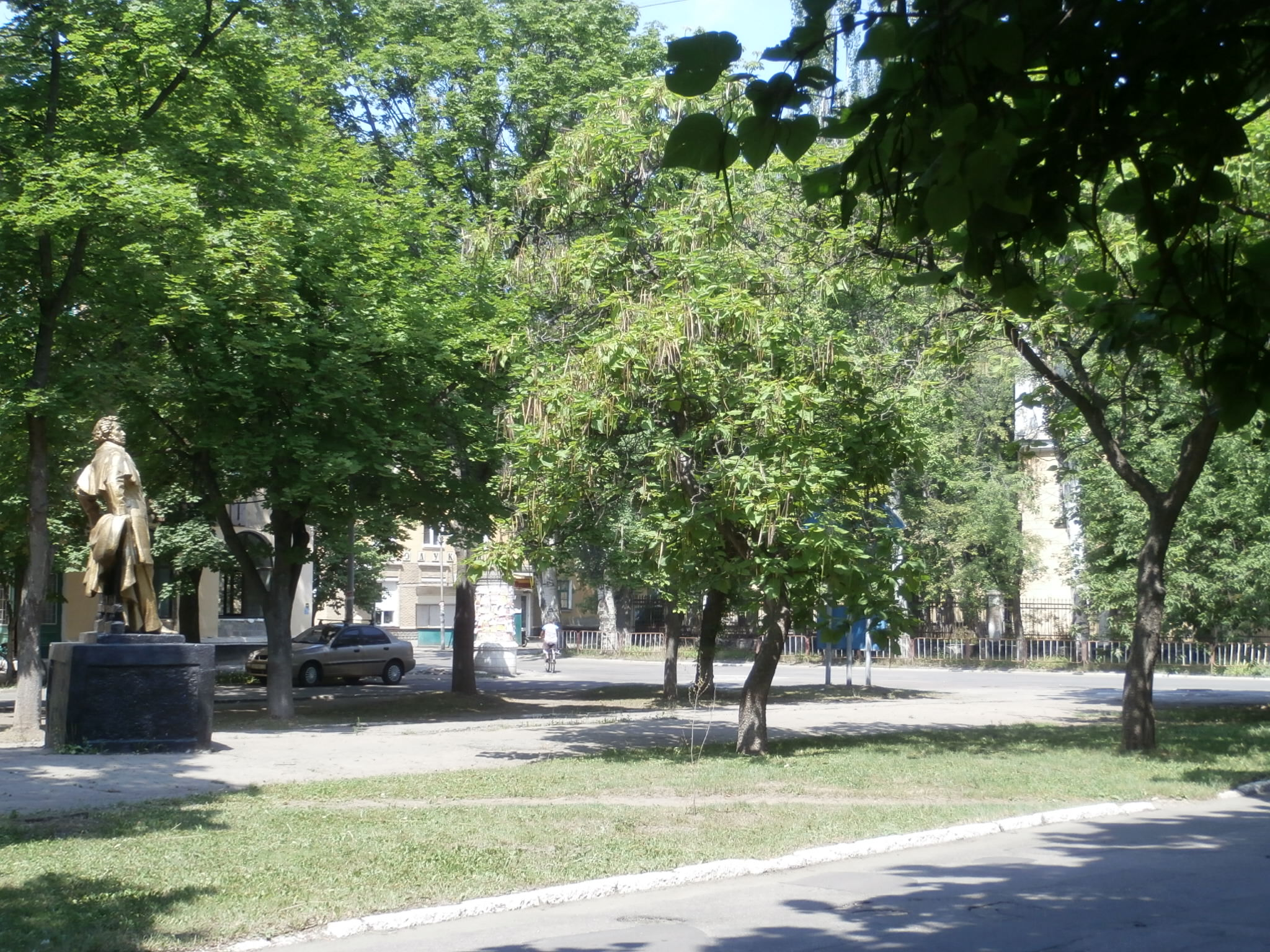 Schowti Wody Altstadt, Ecke Puschkindenkmal